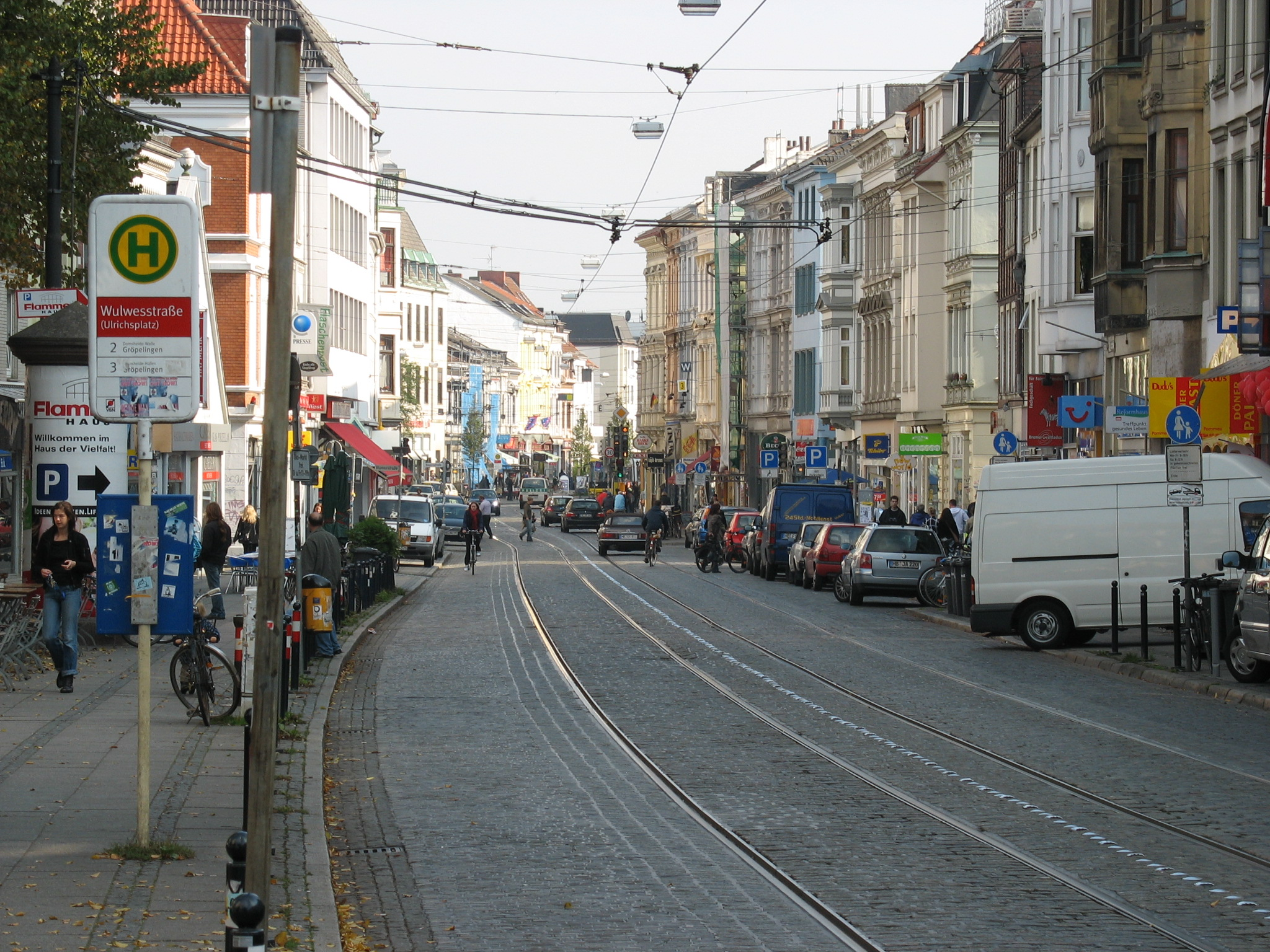 Bremen, Viertel, Ostertorsteinweg vom Ulrichsplatz Richtung Sielwallkreuzung